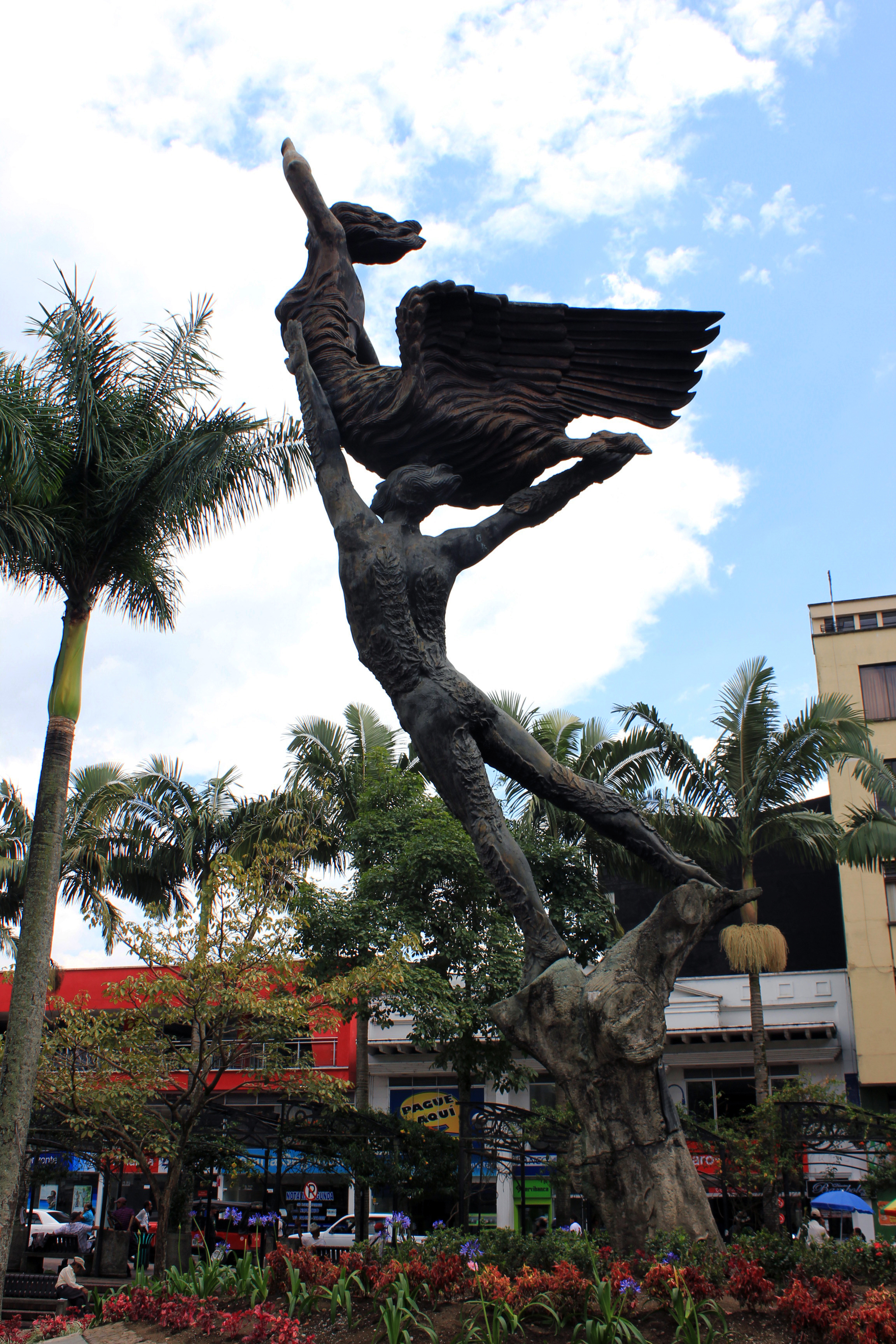 Monumento ubicado en la Plaza de Bolívar de Armenia, Quindío